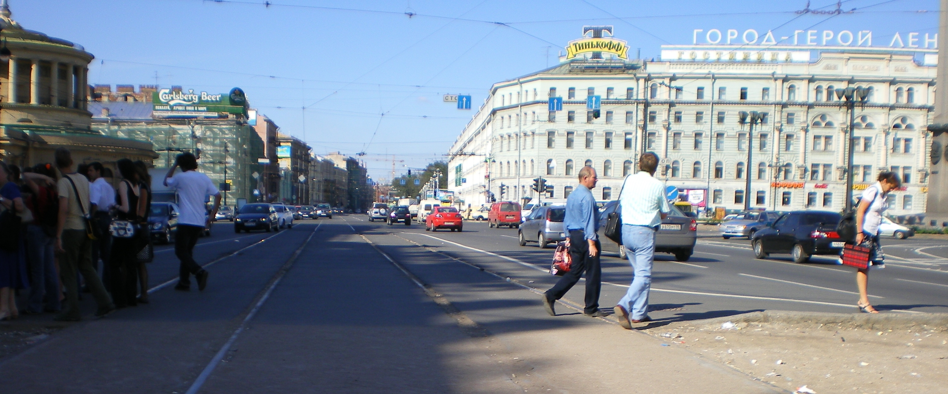 Лиговский проспект через площадь Восстания.